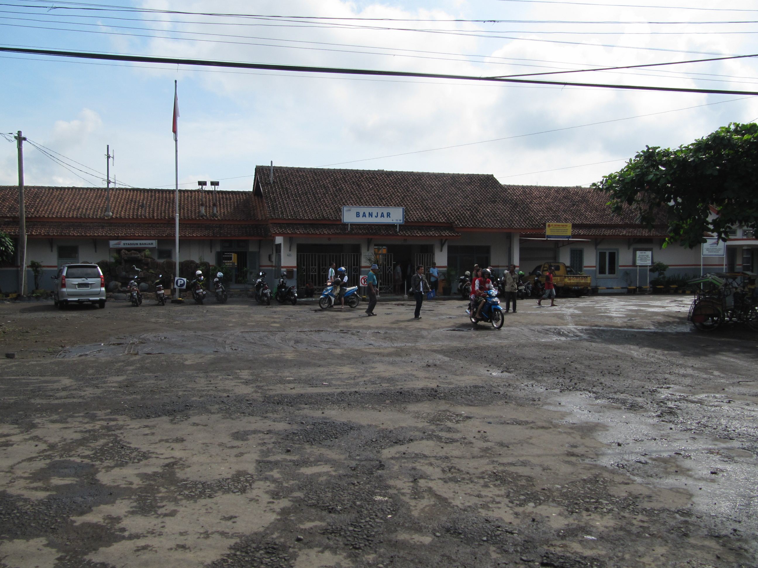 station Banjar